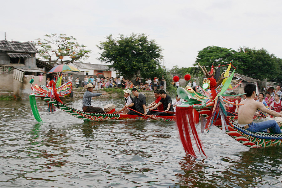 中国水乡赛龙舟